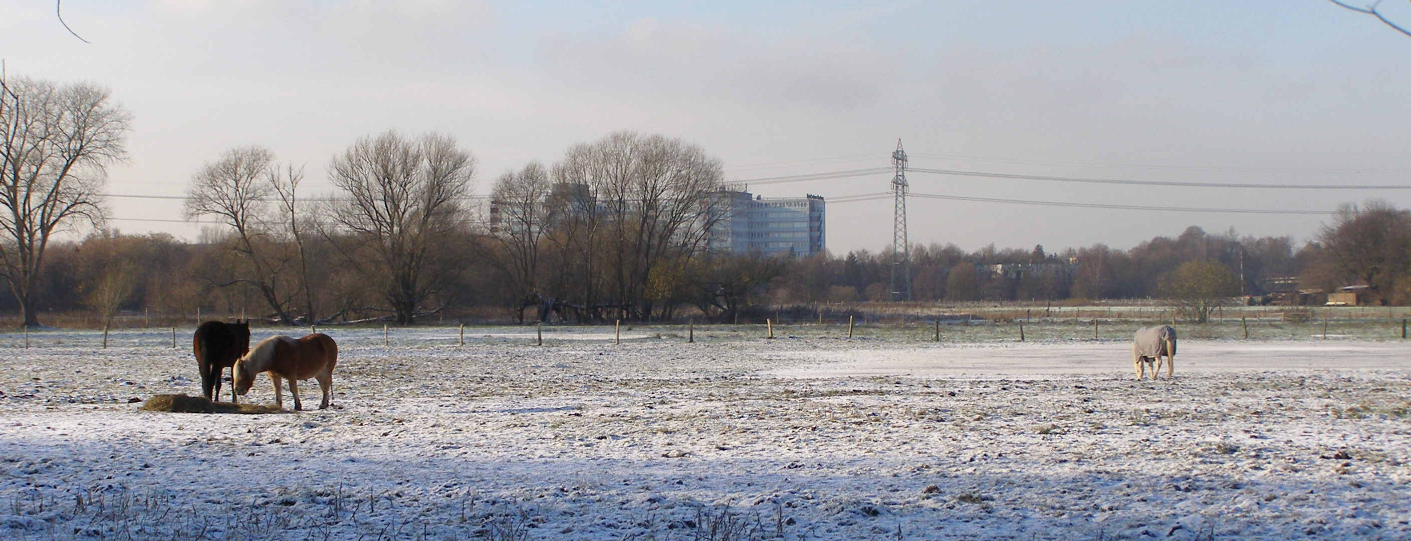 Schnelsener Feldmark zwischen Vielohweg und Wendlohstraße, November 2010 (im Hintergrund das Modezentrum Schnelsen). Hier lag früher das Vielohmoor.